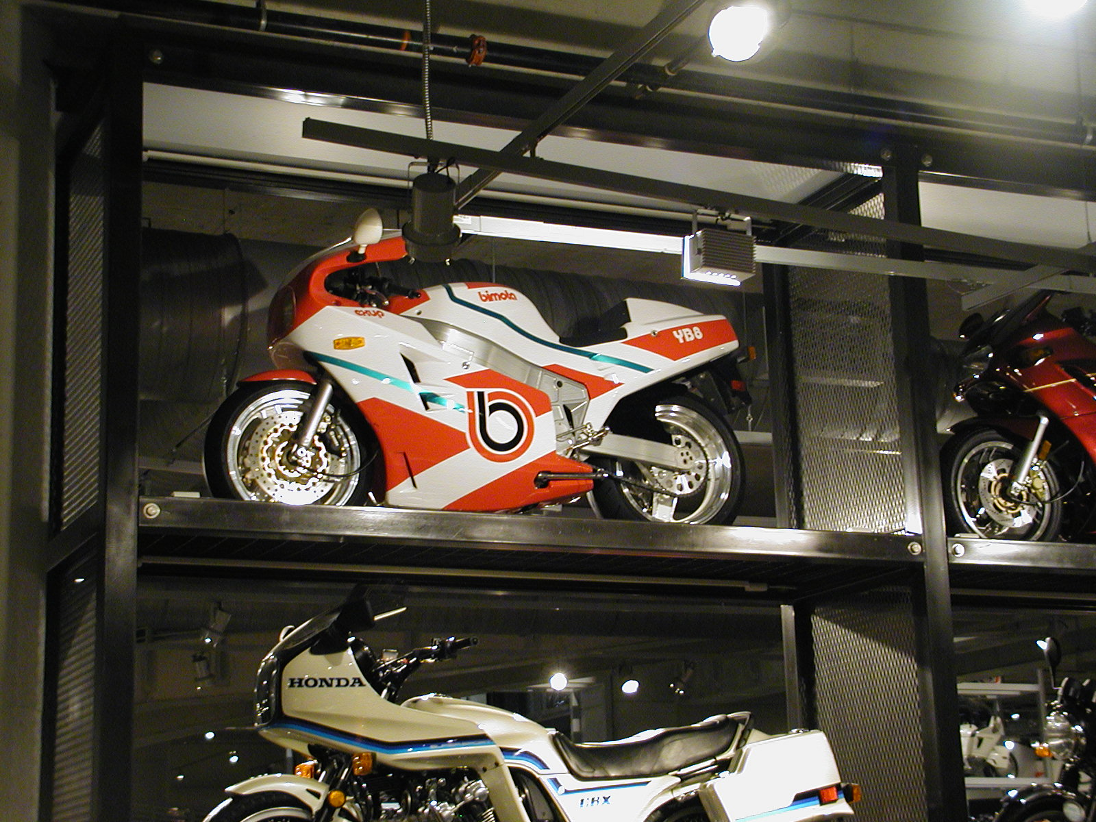 Bimota YB8